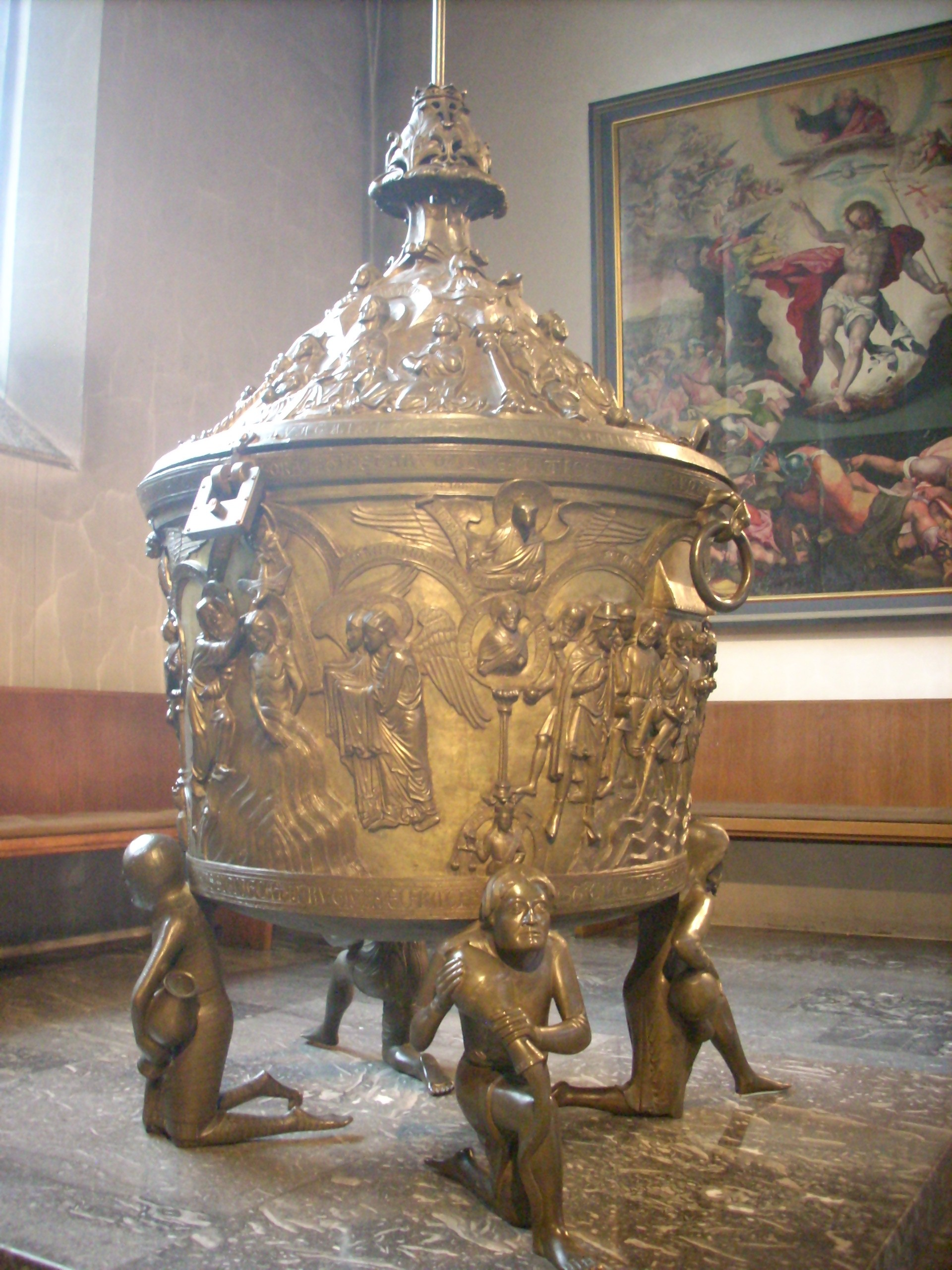 Hildesheim, Dom, Bronzetaufe